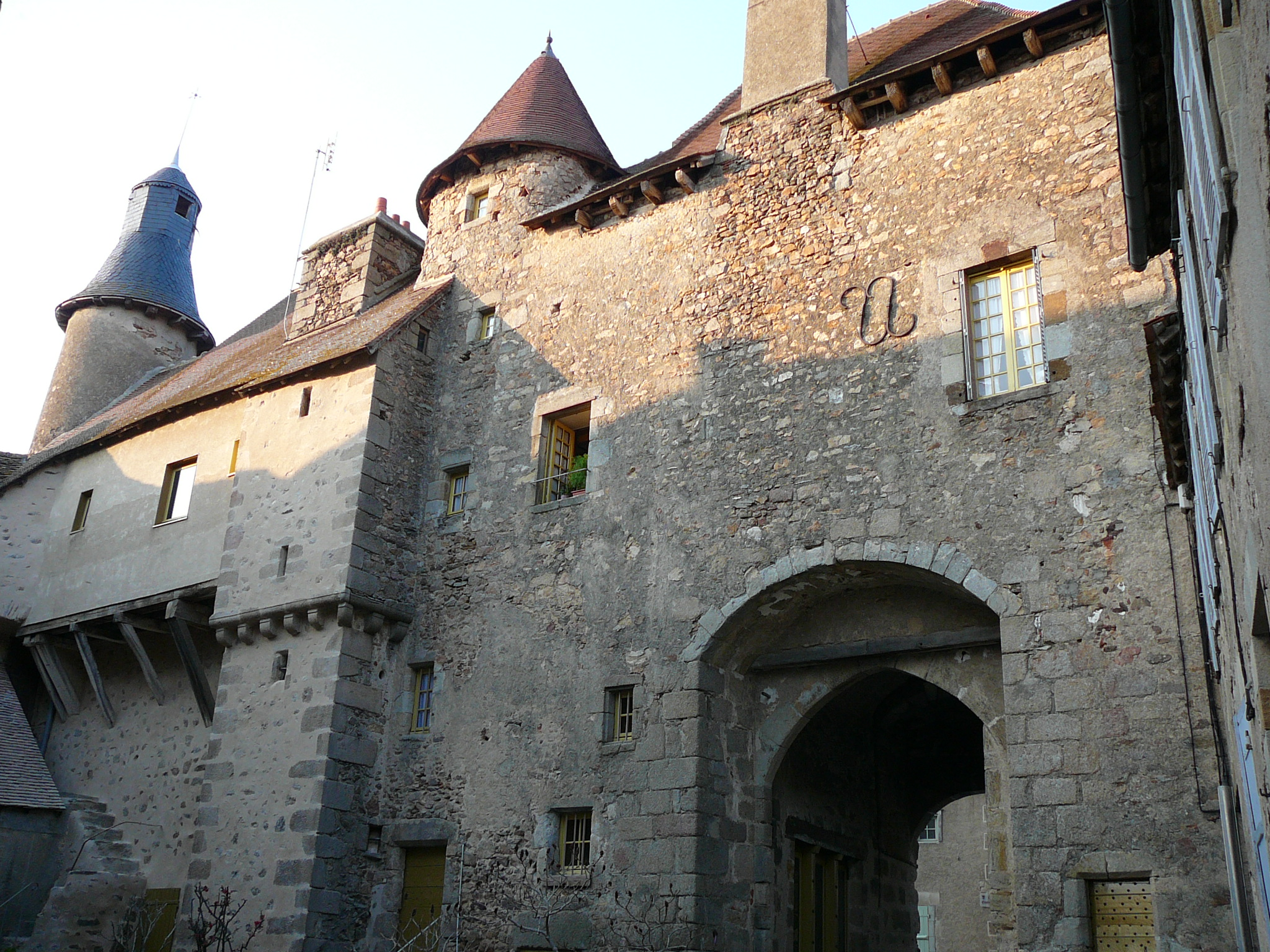 saintbenoitdusault2.jpg